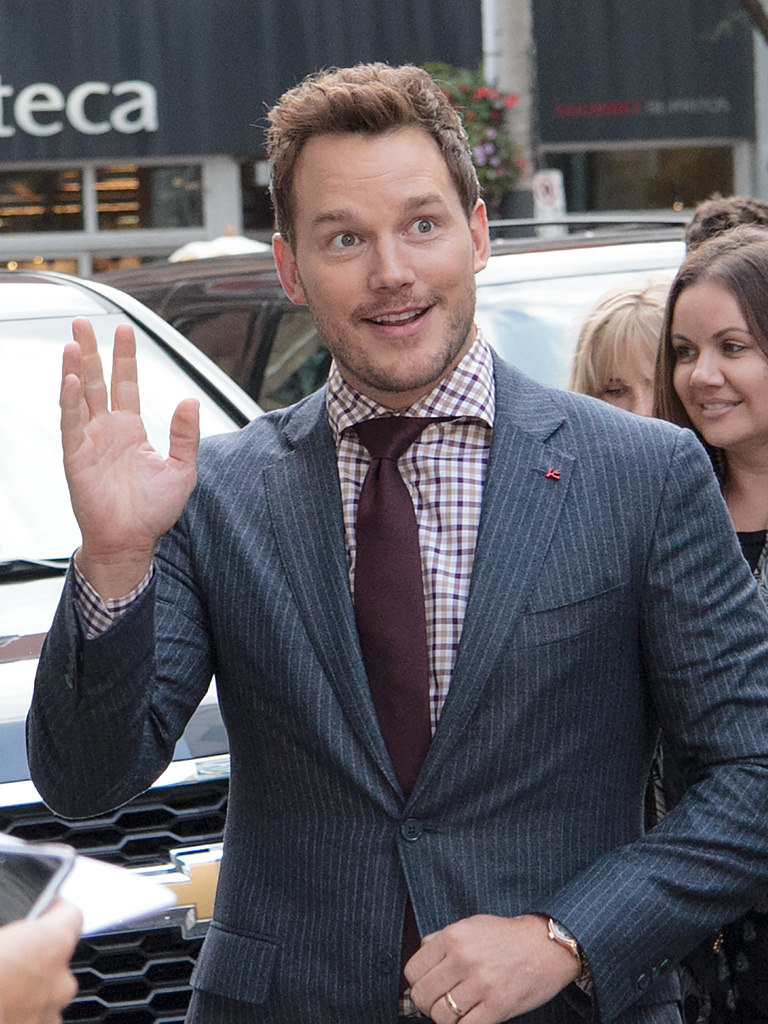 Toronto International Film Festival 2016